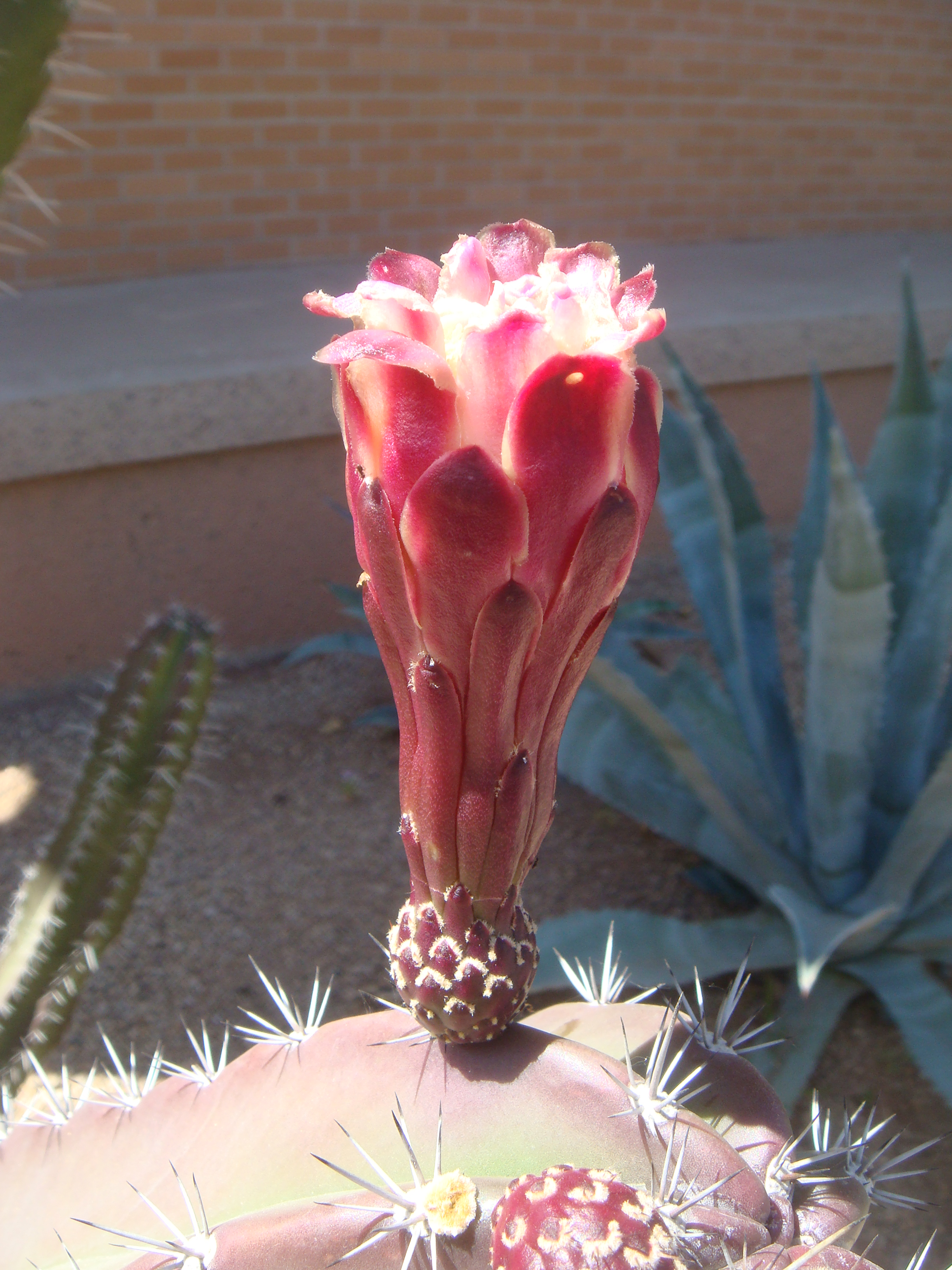 Cereus peruvianus, cultivated, Arizona State University, Tempe, Arizona